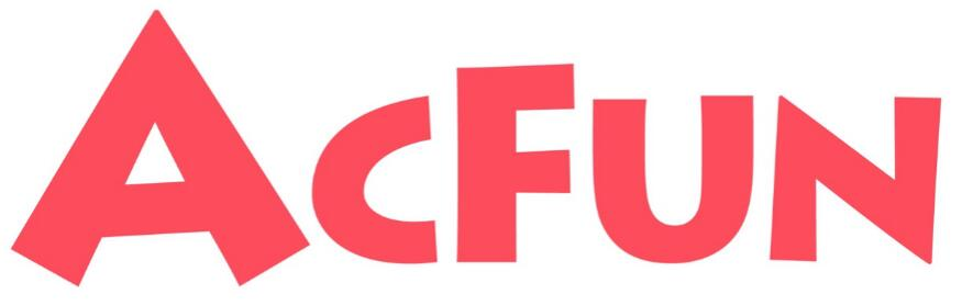 中文（中国大陆）: AcFun logo